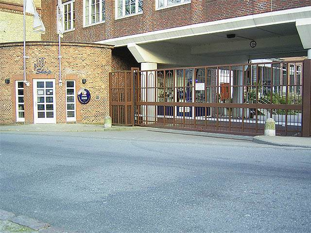 Eingangsbereich der Flensburger Brauerei mit Plop-Shop